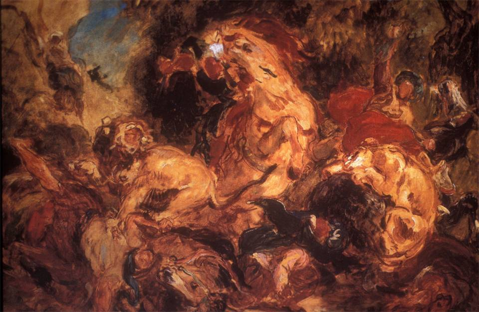 study